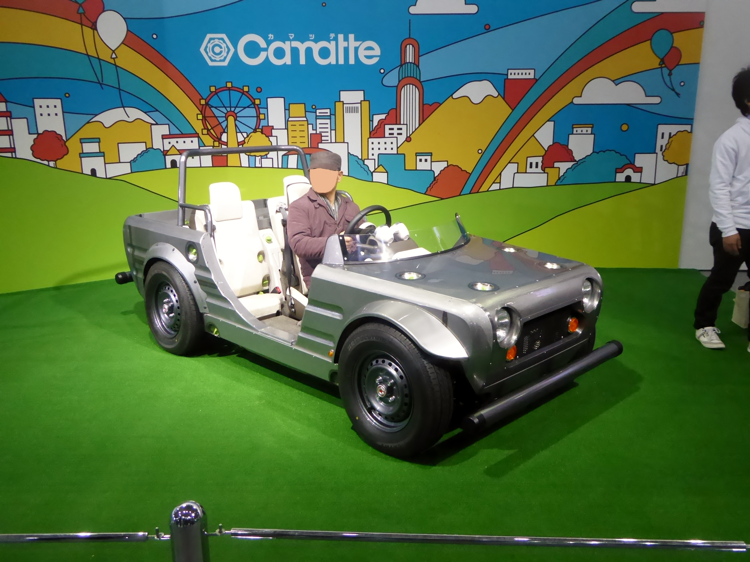 大阪モーターショー2015においてトヨタ・カマッテを撮影。